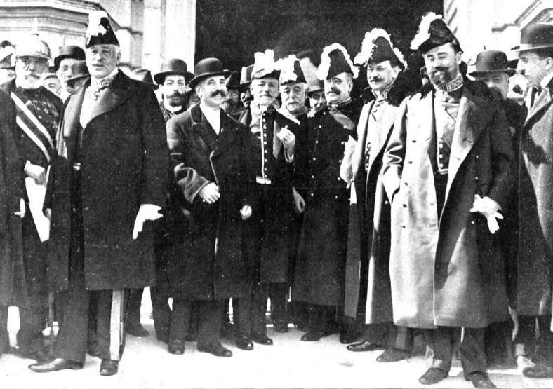 Fotografía que muestra al presidente del Consejo de Ministros de España José Canalejas y a sus ministros a la salida del Palacio Real tras prestar juramento de sus cargos ante el rey, poniendo así fin a una crisis de gobierno.